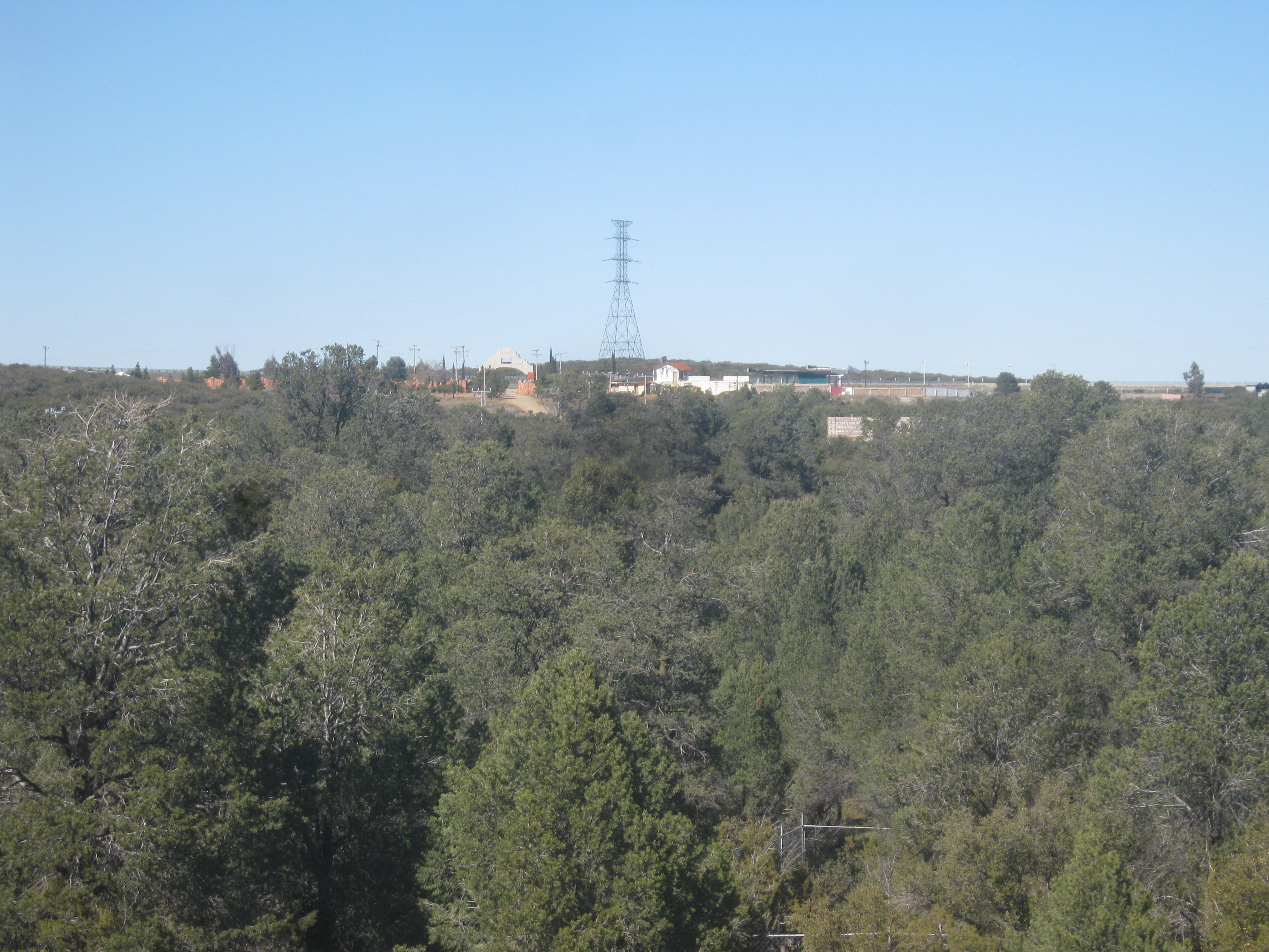 Tecate, Baja California, Mexico